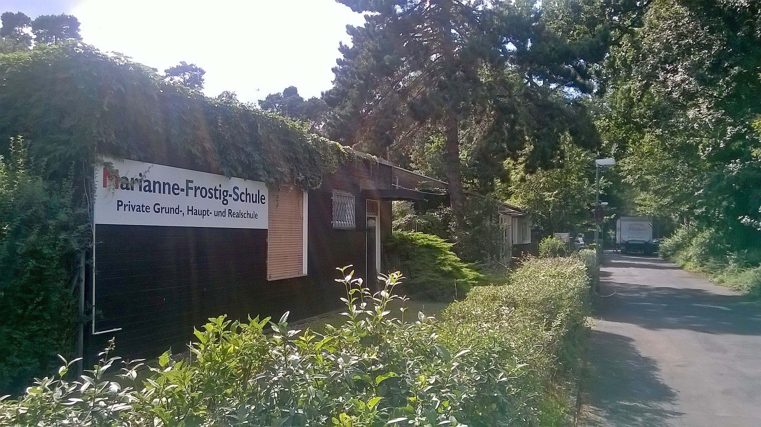 Marianne-Frostig-Schule in Offenbach am Main